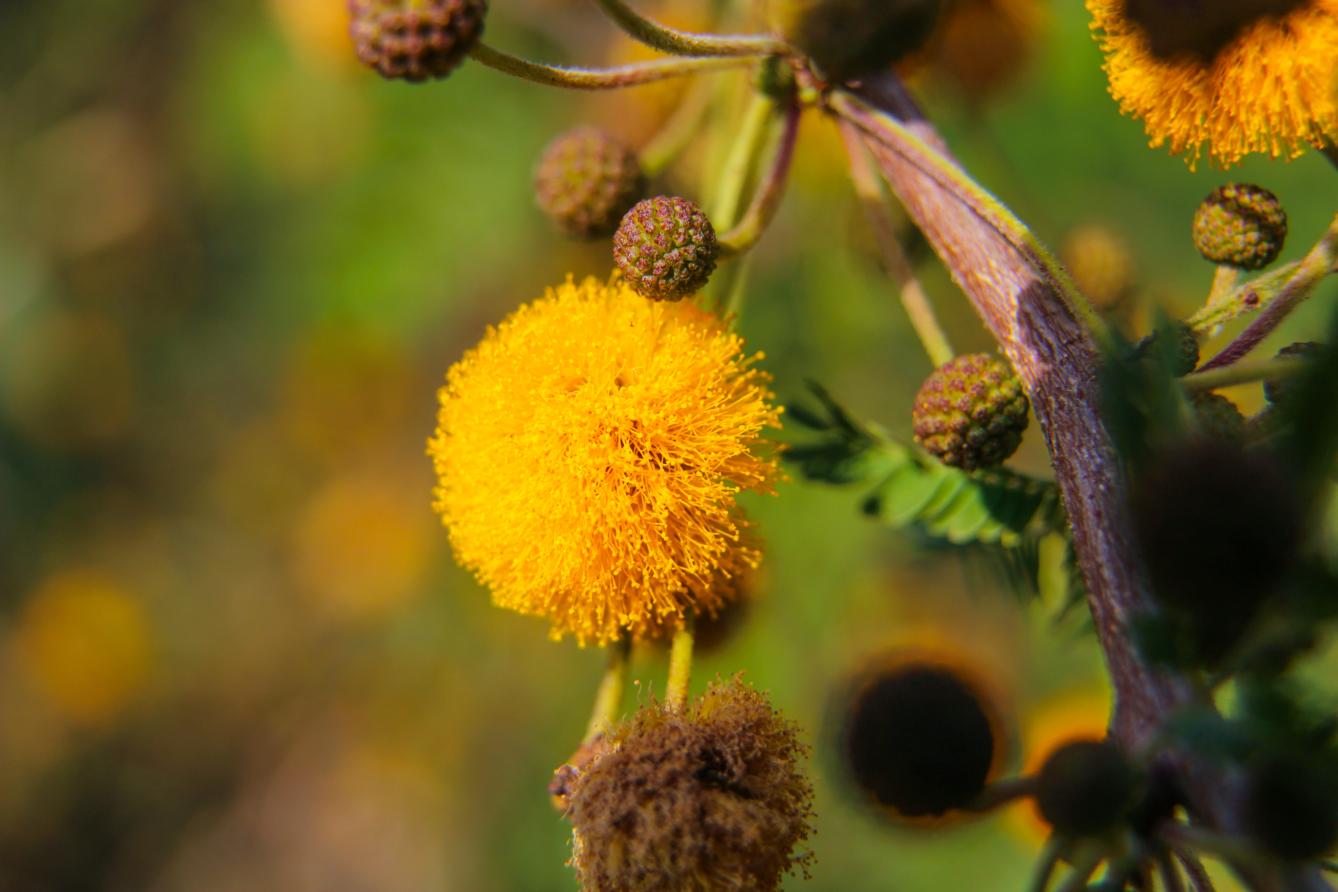 צילום תקריב של פרח השיטה בעזרת עדשת מקרו. צולם בפארק הירדן ינואר 2017.